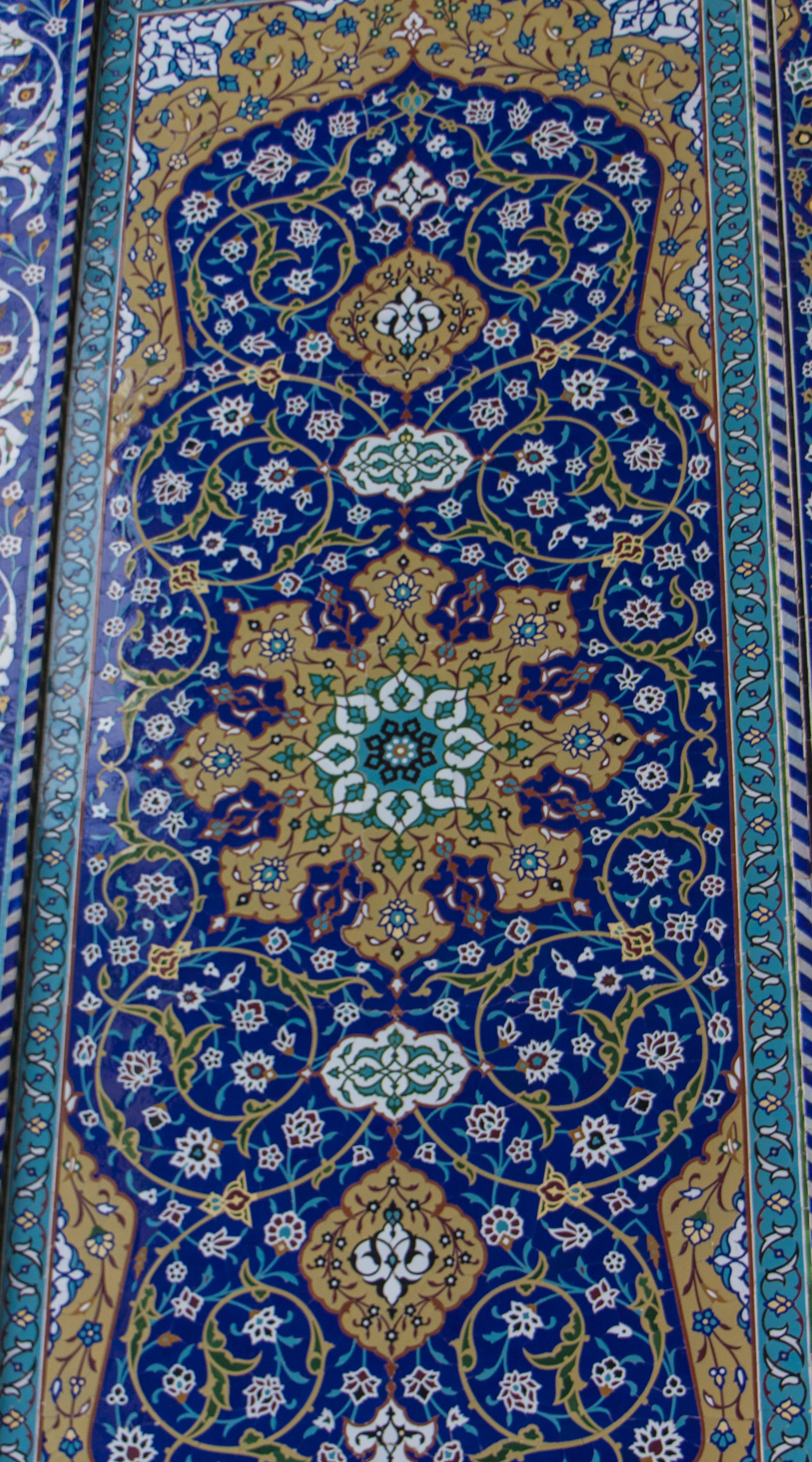 Decorazione